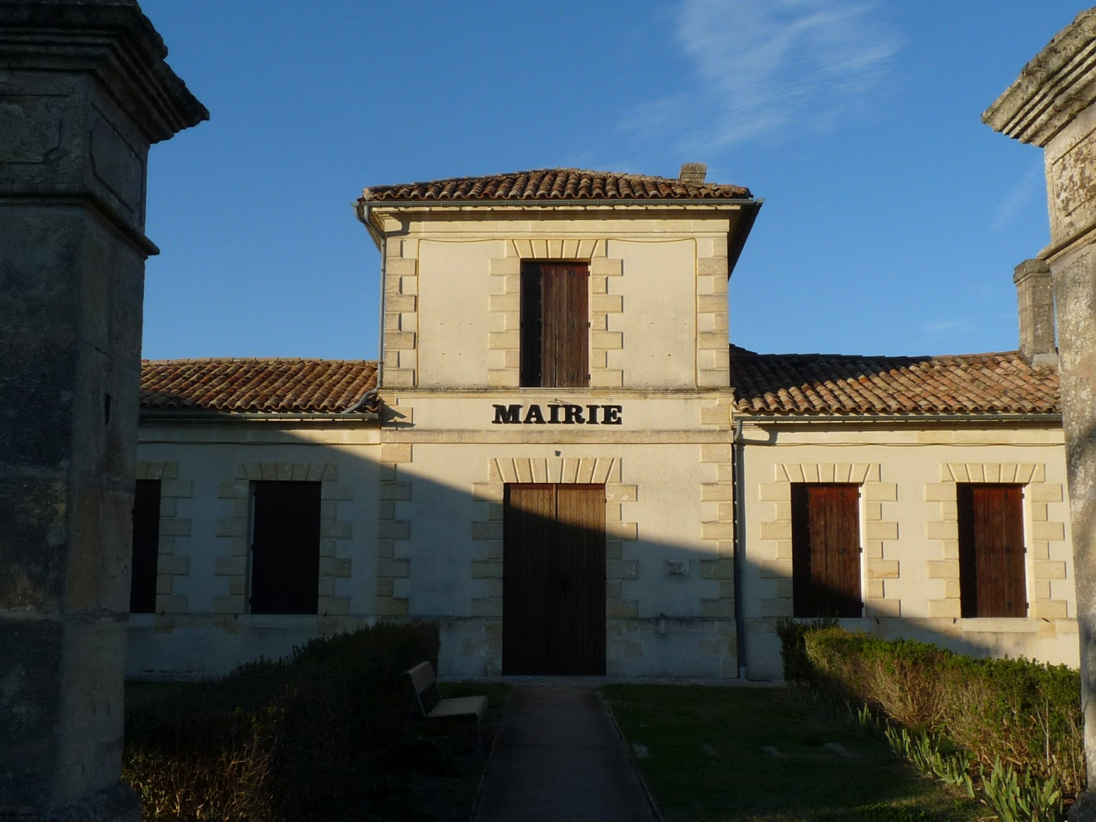 Mairie de Cartelègue, Gironde, France